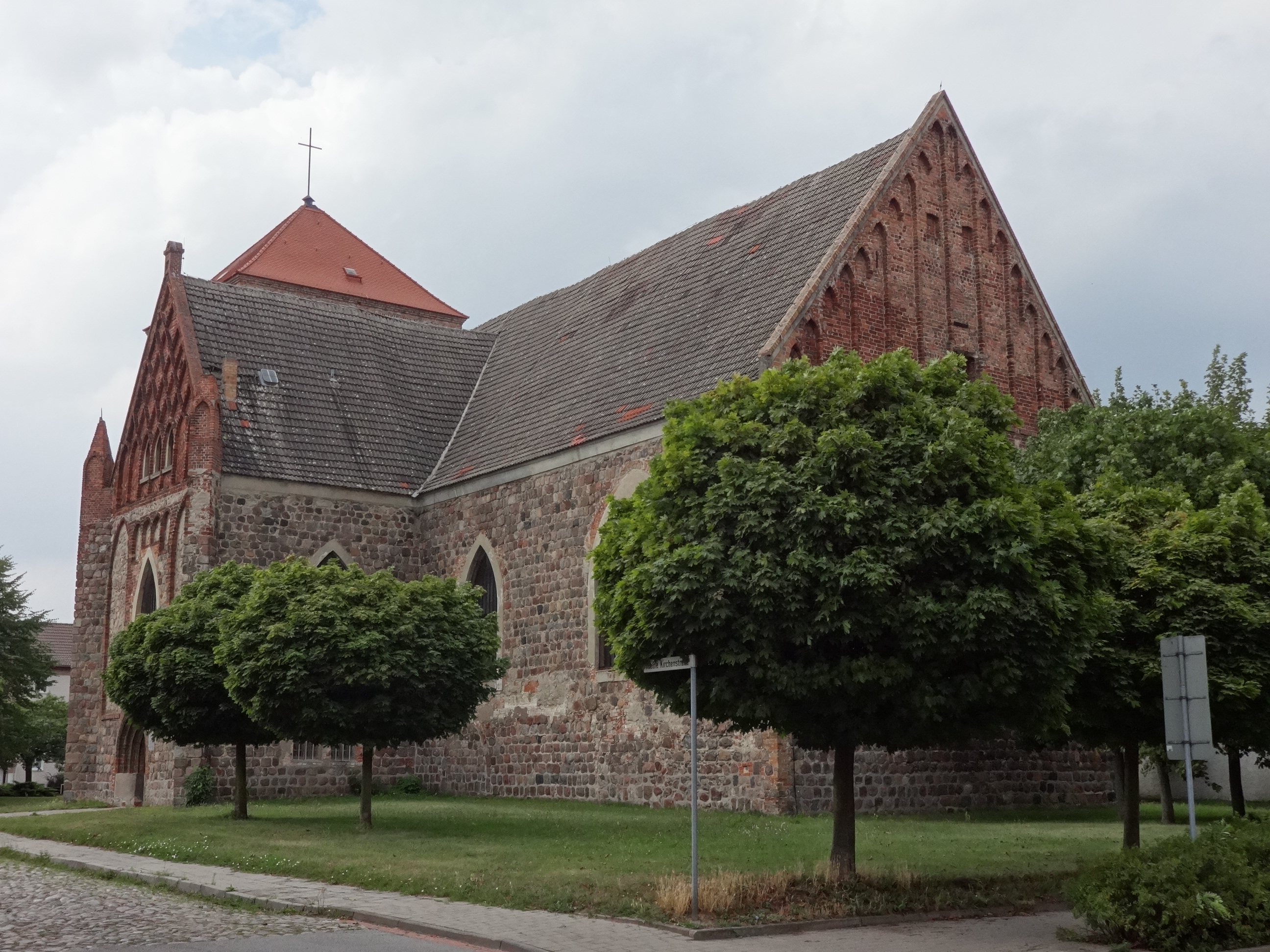 Nikolaikirche aus dem 12. Jahrhundert in Pasewalk. Sie gilt als die größte Feldsteinkirche Mecklenburg-Vorpommerns. Mehrfach zerstört und aufgebaut erhielt sie 1615 einen Renaissanceturm, der 1945 zerstört und abgetragen wurde.